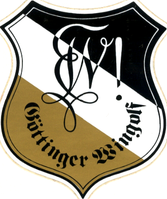 Aufkleber des Göttinger Wingolf